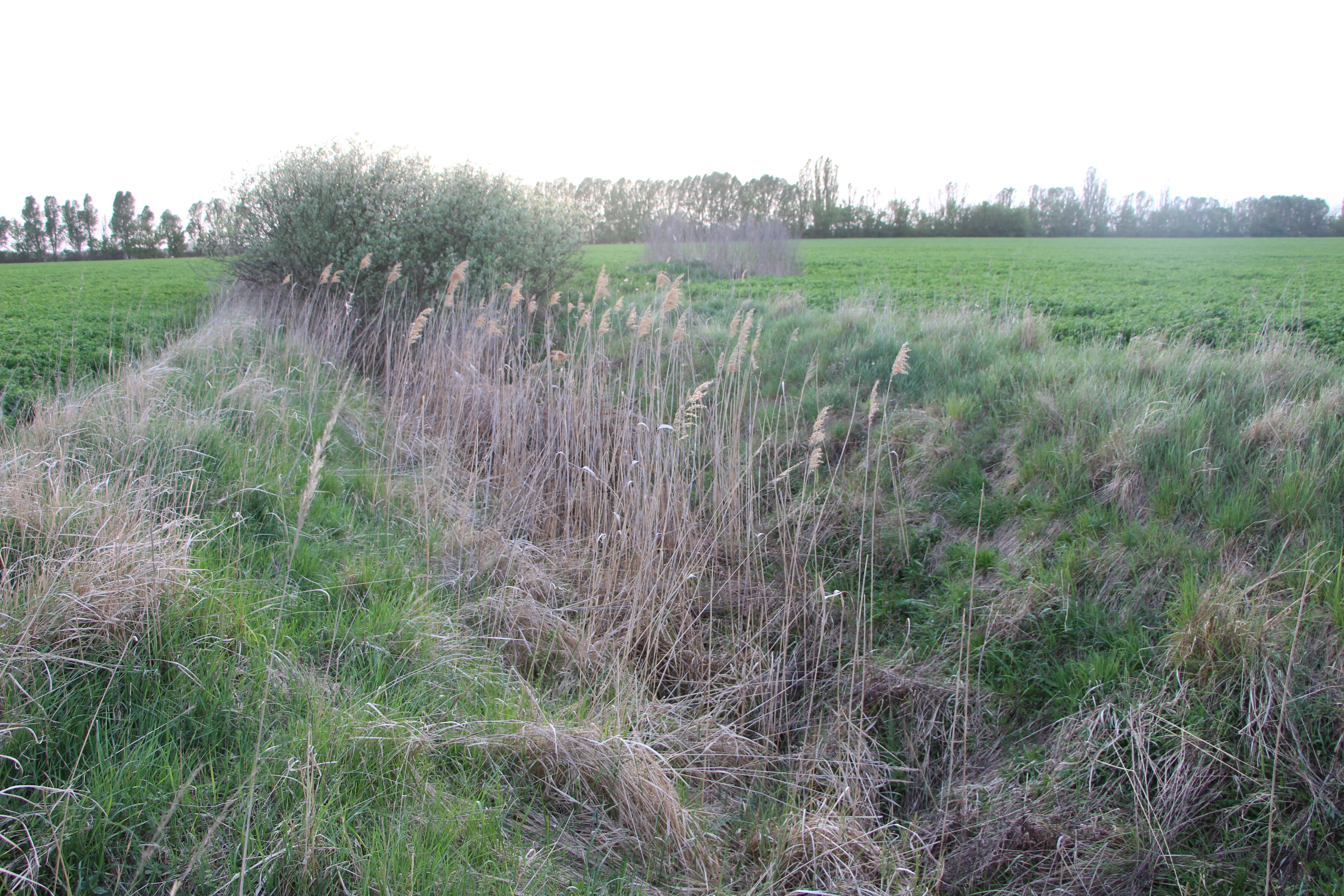 Koryto kanála